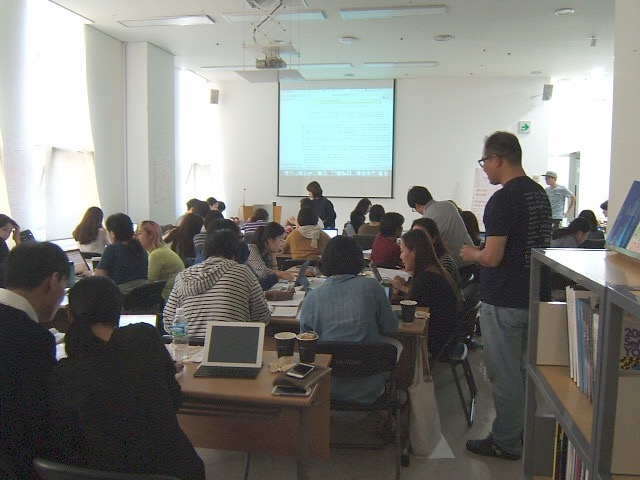 Participants editing at FANTasia Edit-a-thon